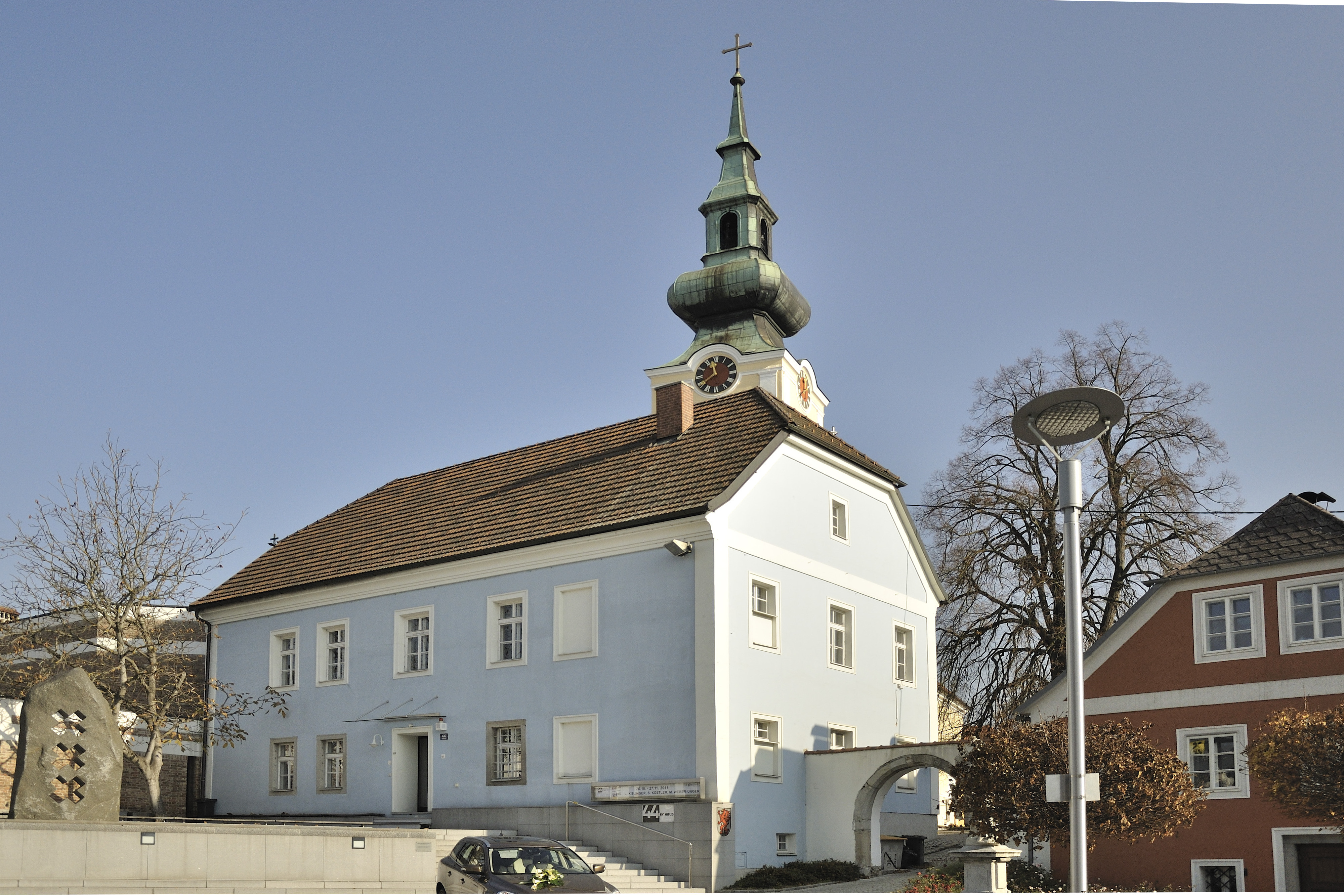 Galerie ""44er Haus"", ehem. Schule. Dahinter die alte Pfarrkirche St. Michael.